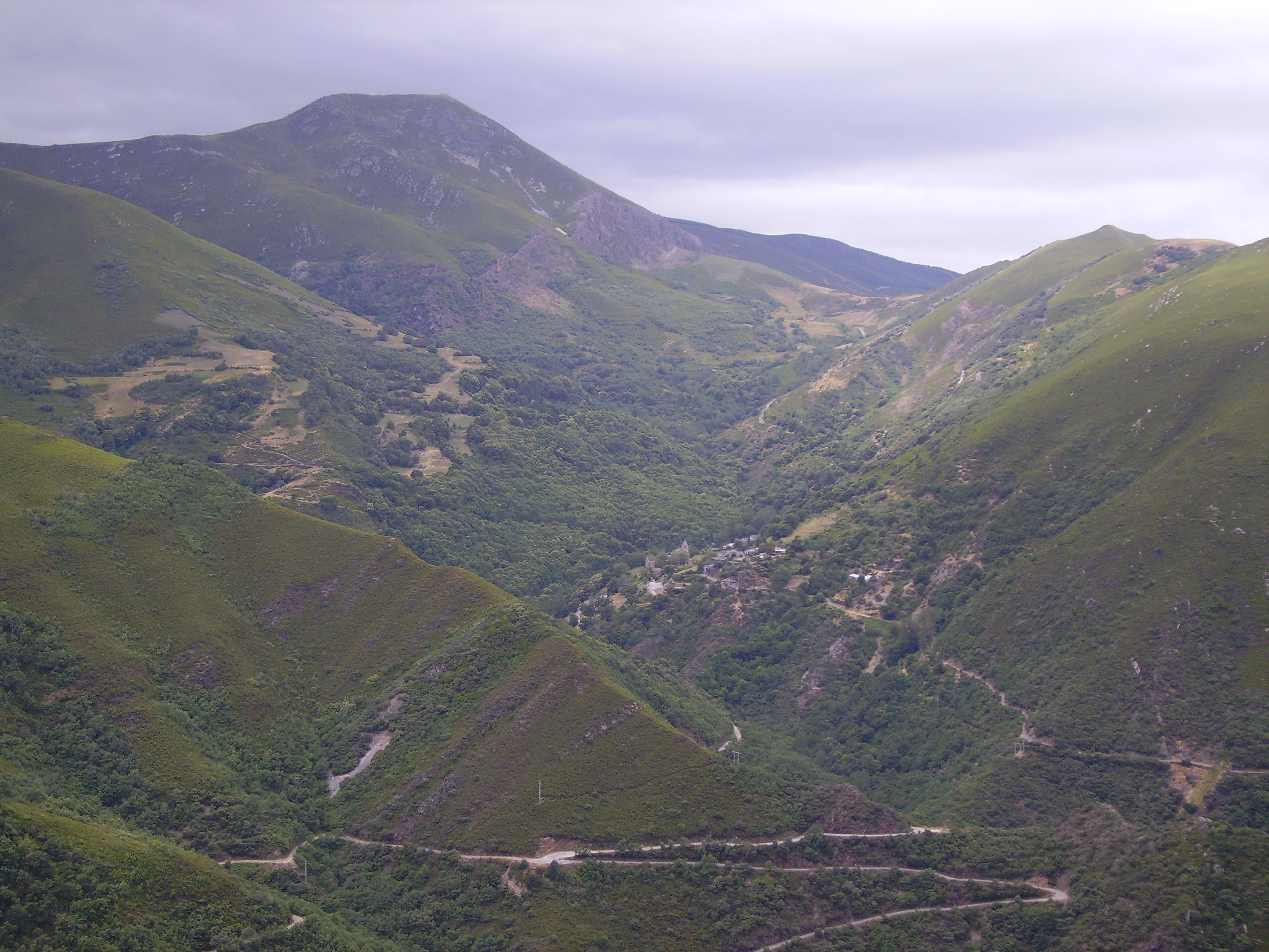 El Pico de la Aquiana y a su falda Montes de Valdueza en los Montes Aquilanos (El Bierzo, León, España).